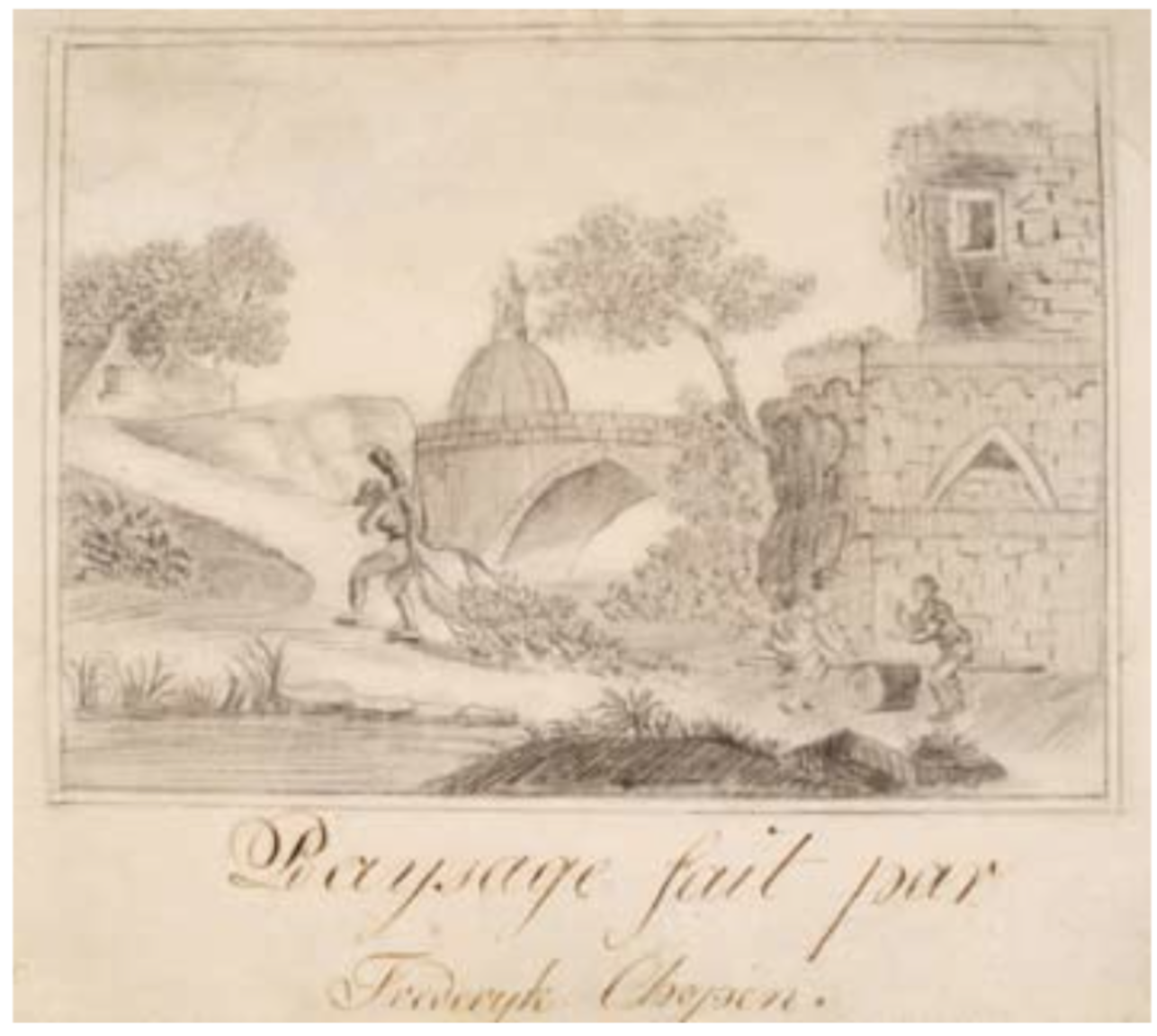 Painting of Chopin